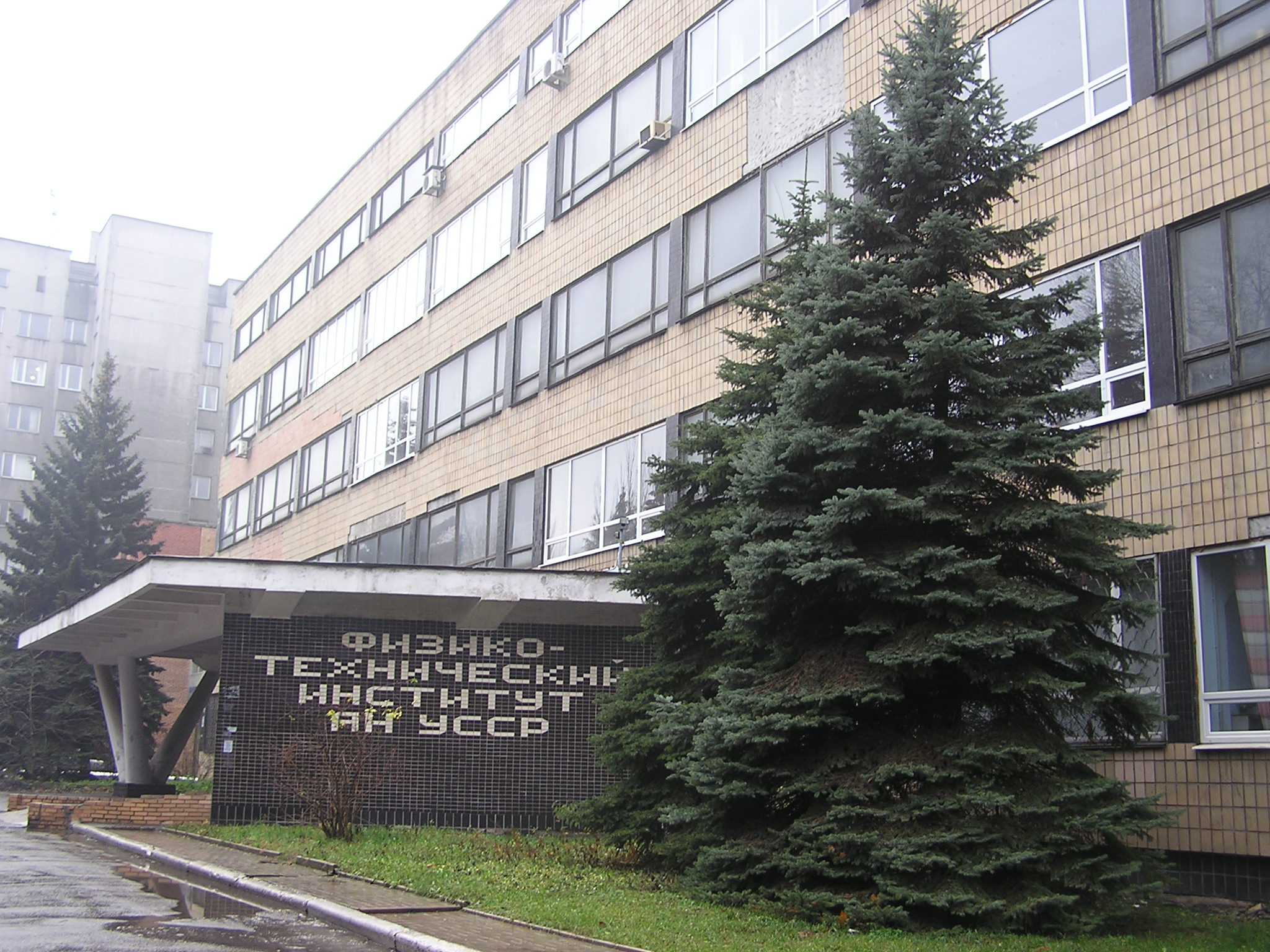 Донецк. Физтех.jpg